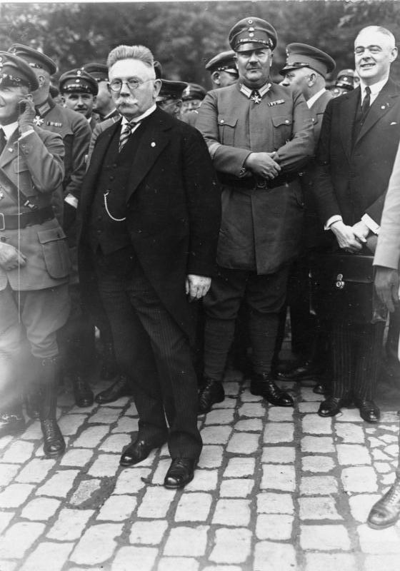 Title: Gründung Harzburger Front, Hugenberg Extra information: Alfred Hugenberg, Prinz Eitel Friedrich von Preußen und der deutschnationale Abgeordnete Otto Schmidt ("Otto Schmidt-Hannover"), Parteisekretär Hugenbergs, während der Tagung in Bad Harzburg im Oktober 1931 (Gründung der Harzburger Front) People in the image: Hugenberg, Alfred Dr.: Reichsminister für Wirtschaft und Ernährung, Deutschnationale Volkspartei (DNVP), Deutschland (GND 118554565) Preußen, Eitel Friedrich von: 1883-1942, Generalmajor, Deutschland Factual corrections and alternative descriptions are encouraged separately from the original description. Additionally errors can be reported at this page to inform the Bundesarchiv. Original historic description